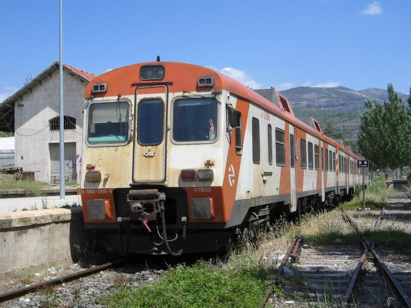 Unitat 593 a La Pobla de Segur.jpg